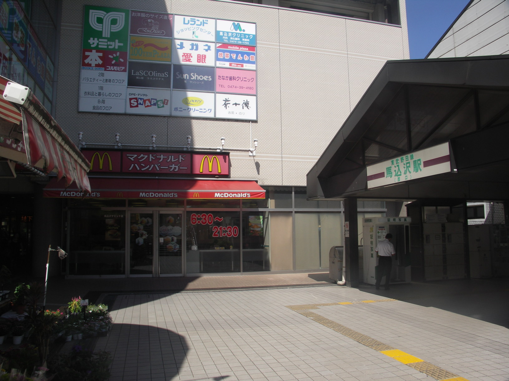 Magomezawa station west, Tobu-Noda Line, Chiba, Japan, 馬込沢駅西口